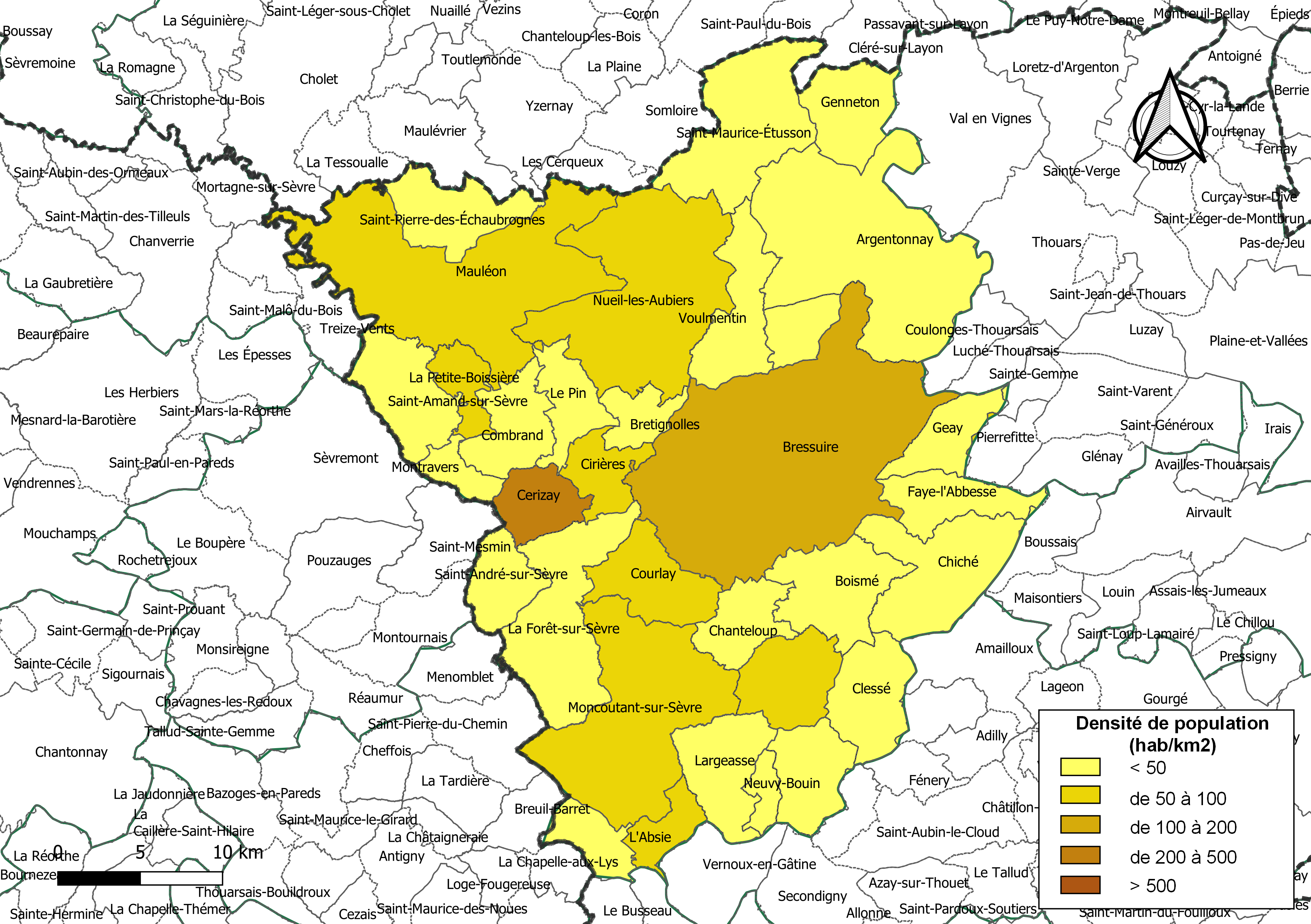 Carte des densités de population (millésimée 2016) des communes de la Communauté d'agglomération du Bocage Bressuirais, département des Deux-Sèvres, France. Composition au 1er janvier 2019.